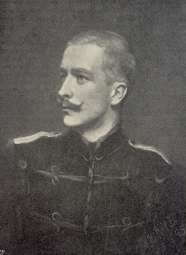 Max Koner: Porträt Leutnant Dr. Adolph von Flöckher, 1895